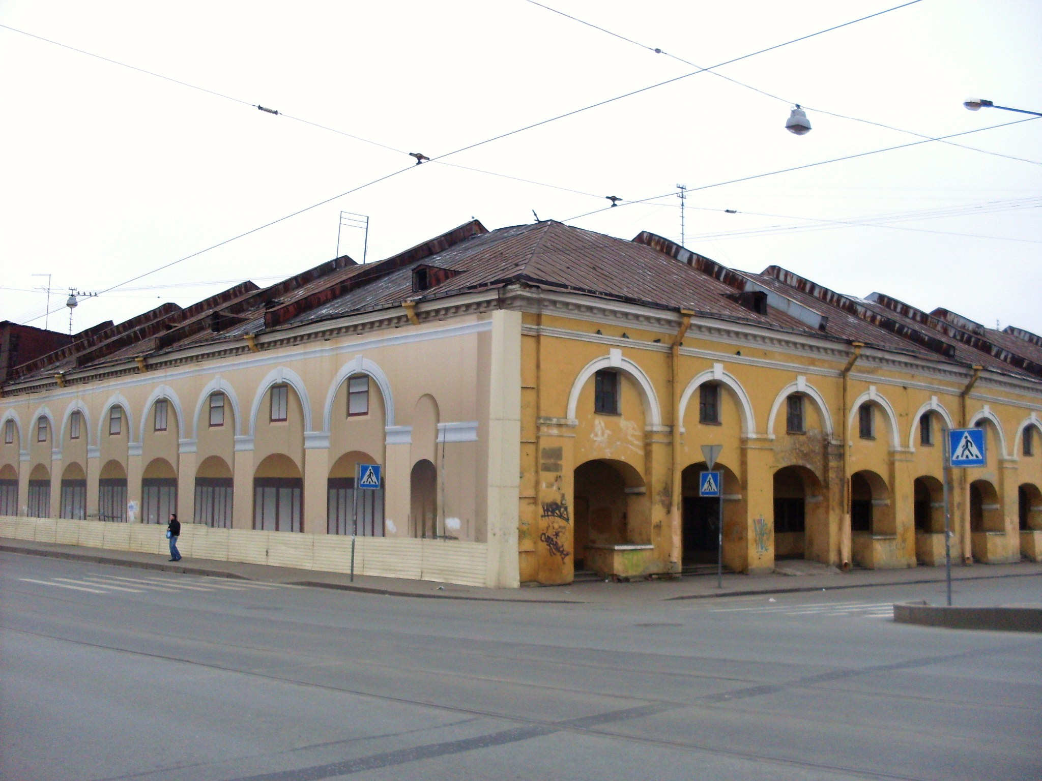 Никольский рынок в Санкт-Петербурге (2009)